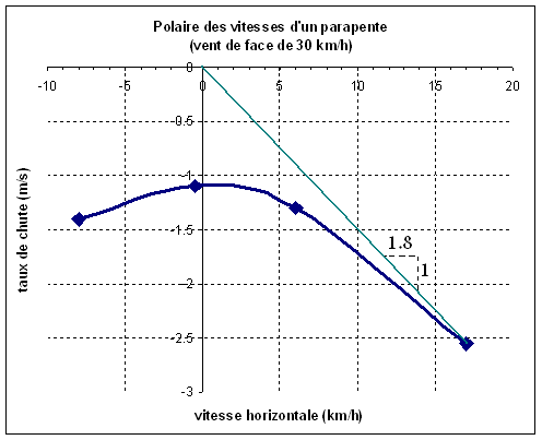 polaire des vitesses par rapport au sol d'un parapente avec 30 km/h de vent de face